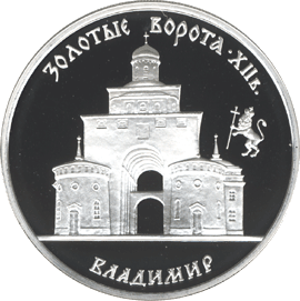 Монета Банка России — Серия: «Памятники архитектуры России», Золотые ворота, XII в., г. Владимир, 3 рубля, реверс.